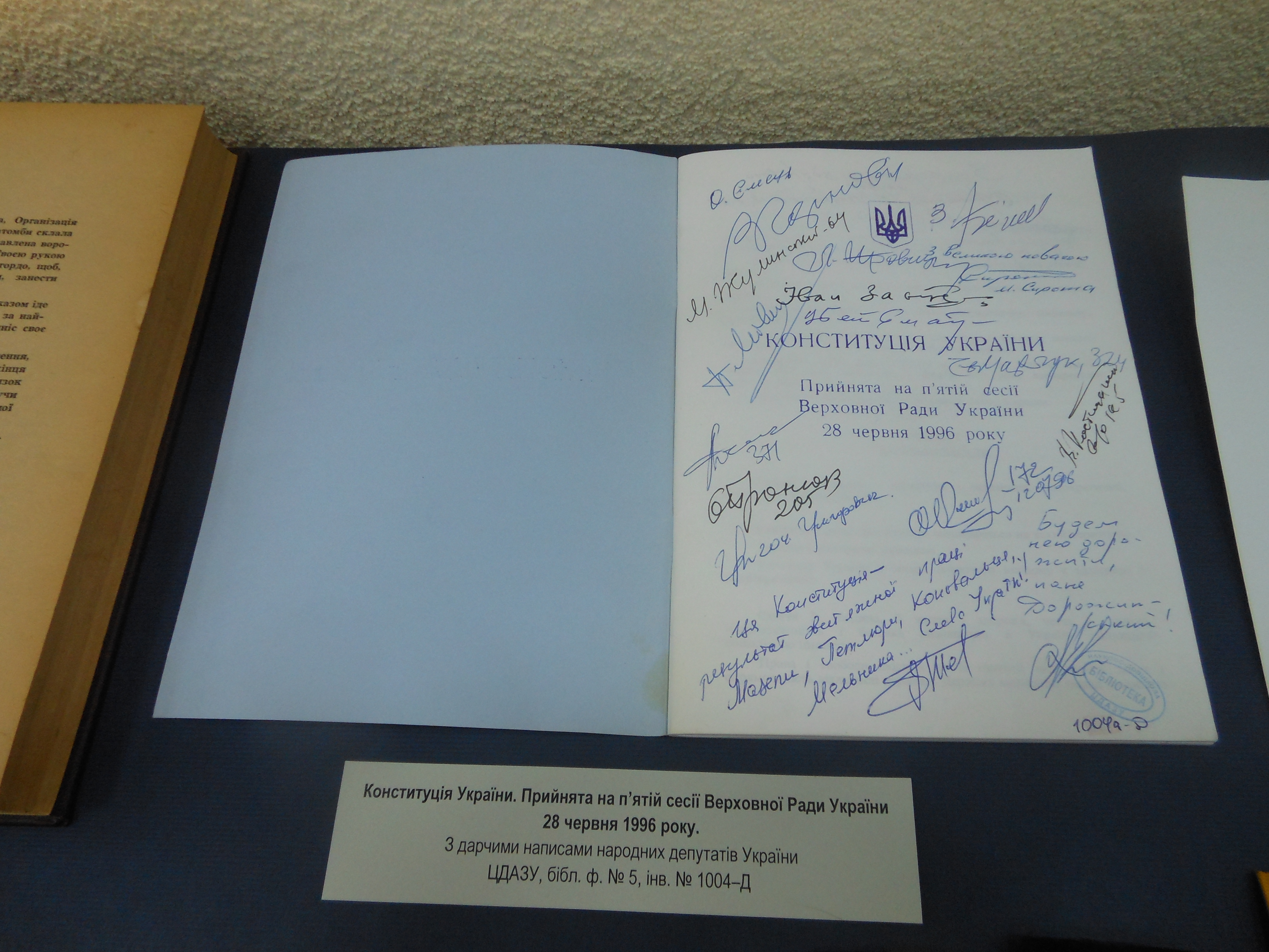 Прес-конференція з нагоди 10-ї річниці утворення Центрального державного електронного архіву України та Центрального державного архіву зарубіжної україніки